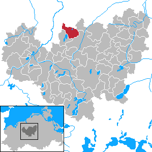 Dolgen am See in Mecklenburg-Vorpommern - District Güstrow